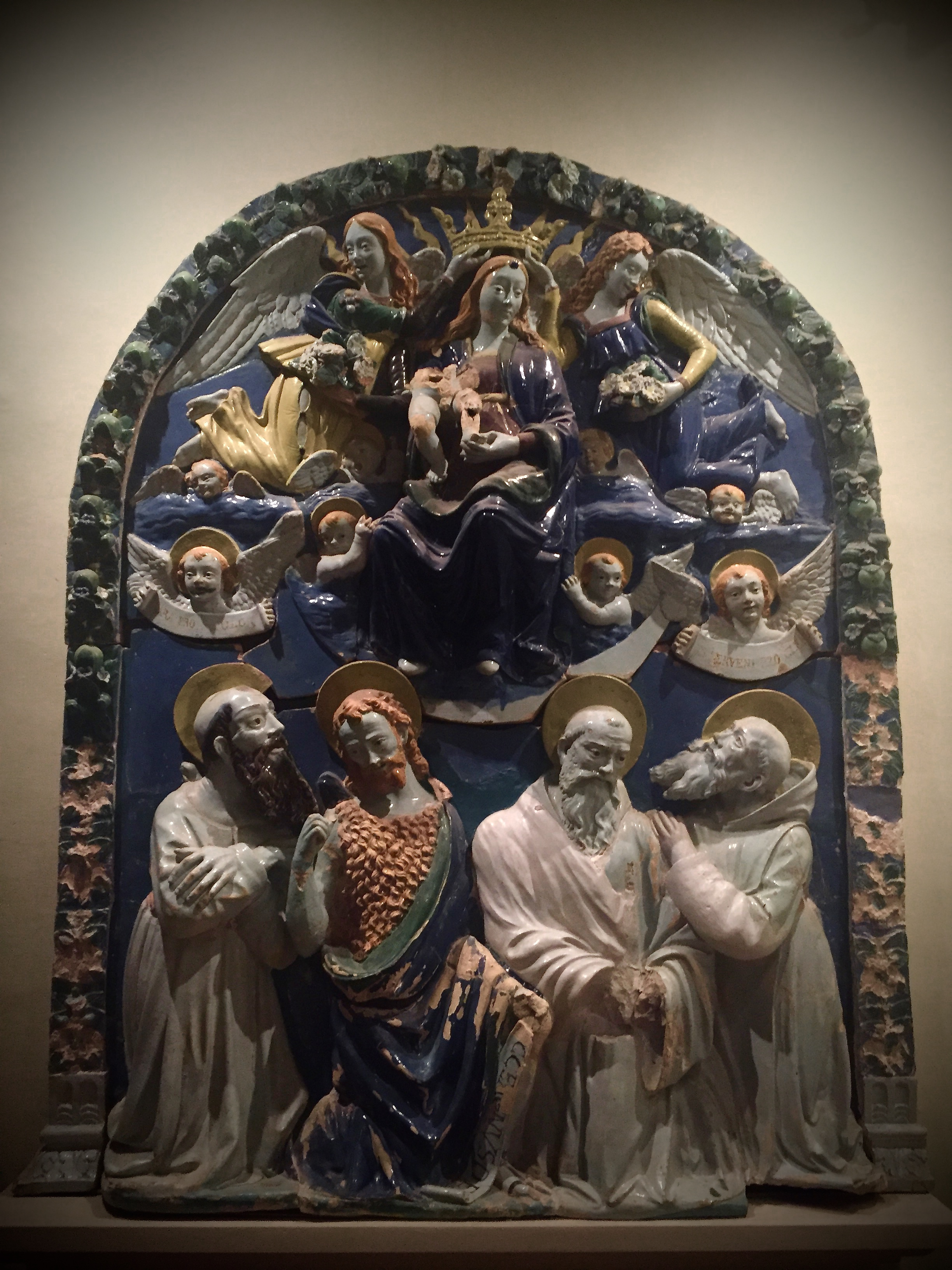 Madonna con Bambino con san Giovanni Mario di Cupramontana, san Giovanni Battista, san Romualdo e il beato Sabattini - Grande Terrecotte invetriate del 1516 di Pietro Paolo Agabiti.